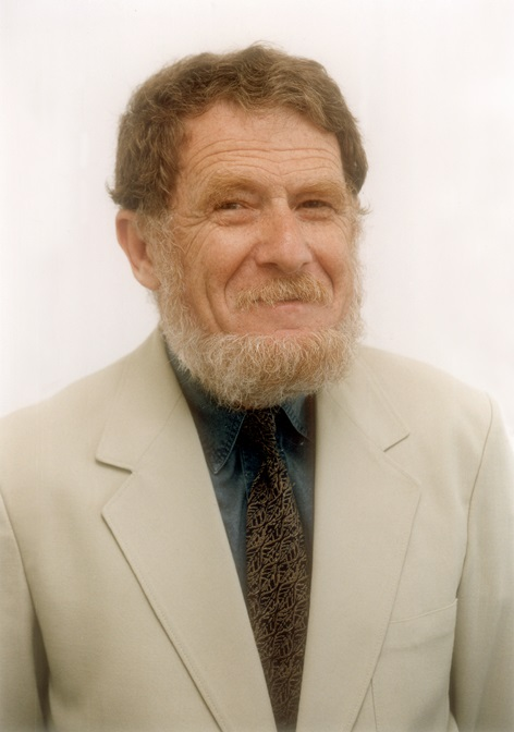 פרופסור אלי רוזיק